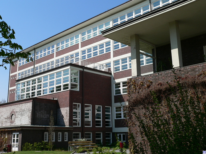 Bebauung in der Jarrestadt, Schule Meerweinstraße in Hamburg (24.4.2005) Architekt: Fritz Schumacher